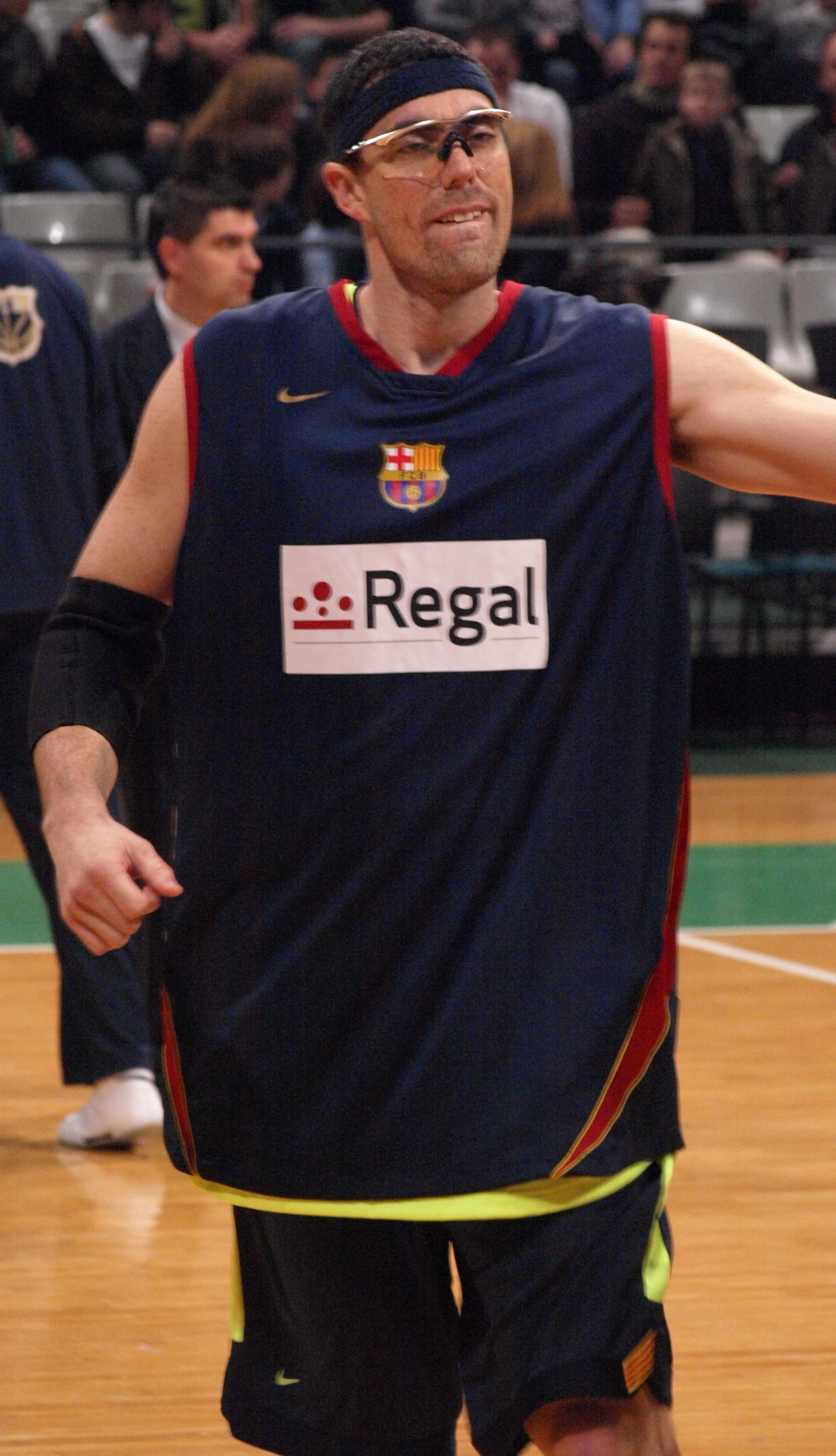 Daniel Santiago, en el partido que enfrentó al FC Barcelona y al DKV Joventut de liga ACB en el Olímpico de Badalona en enero de 2009